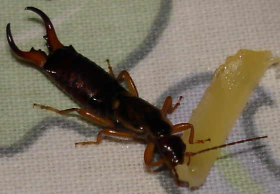 Gemeiner Ohrwurm (Forficula auricularia)